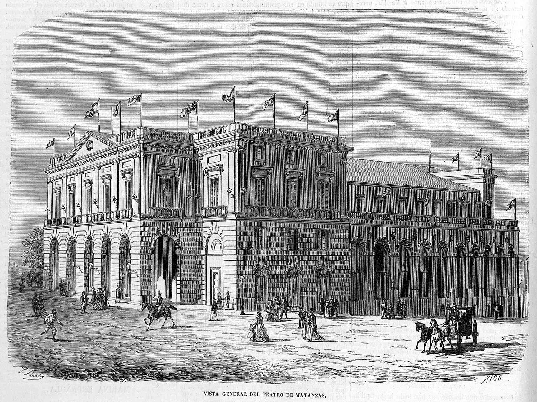 Vista general del Teatro Sauto, en la revista española El Museo Universal.